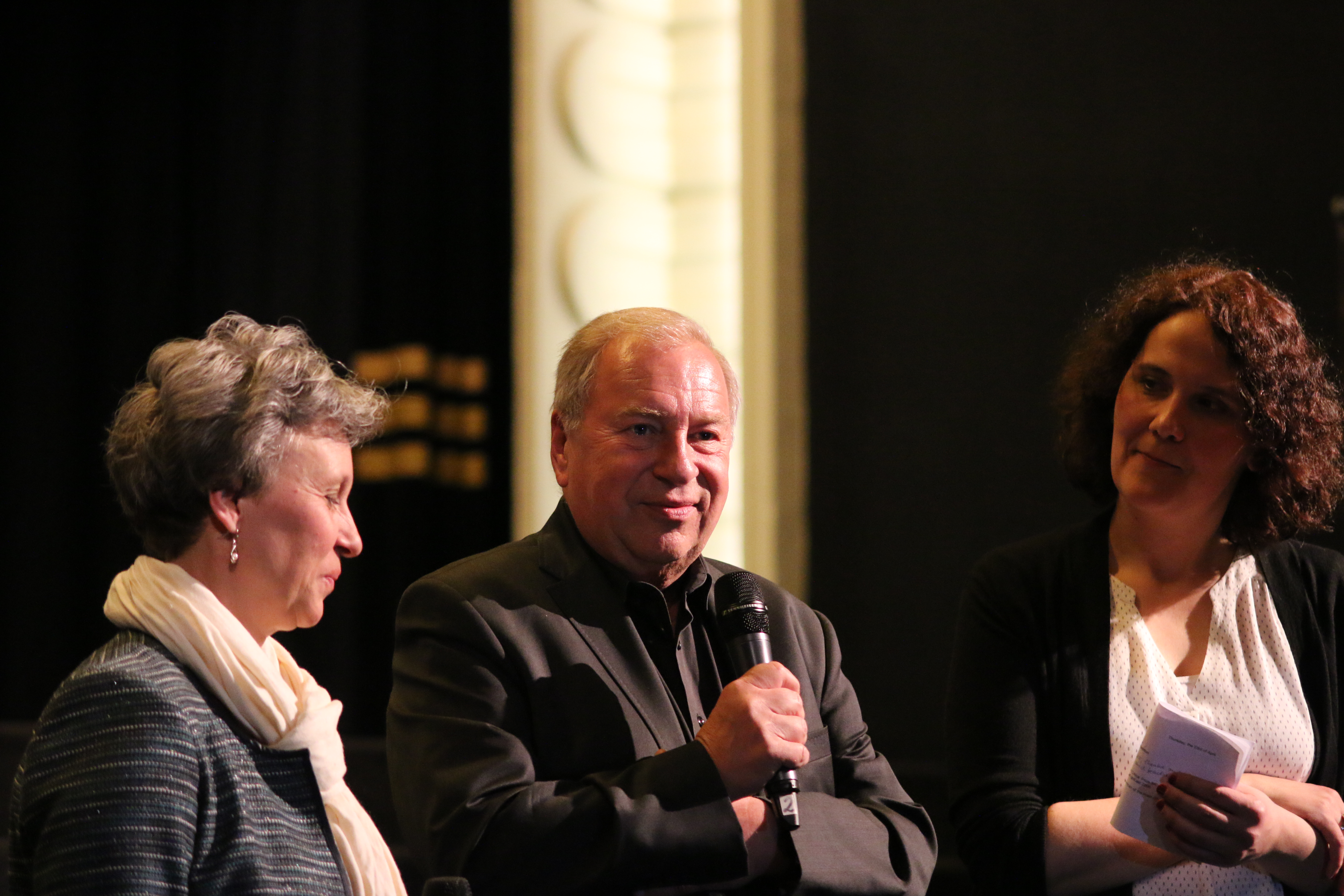 15. GoEast Festival, Wiesbaden 2015: Der polnische Regisseur Jerzy Stuhr und die Festivalleiterin Gaby Babic (Rechts) sowie eine Dolmetscherin (links). Bei der Deutschlandpremiere des Films "Bürger"